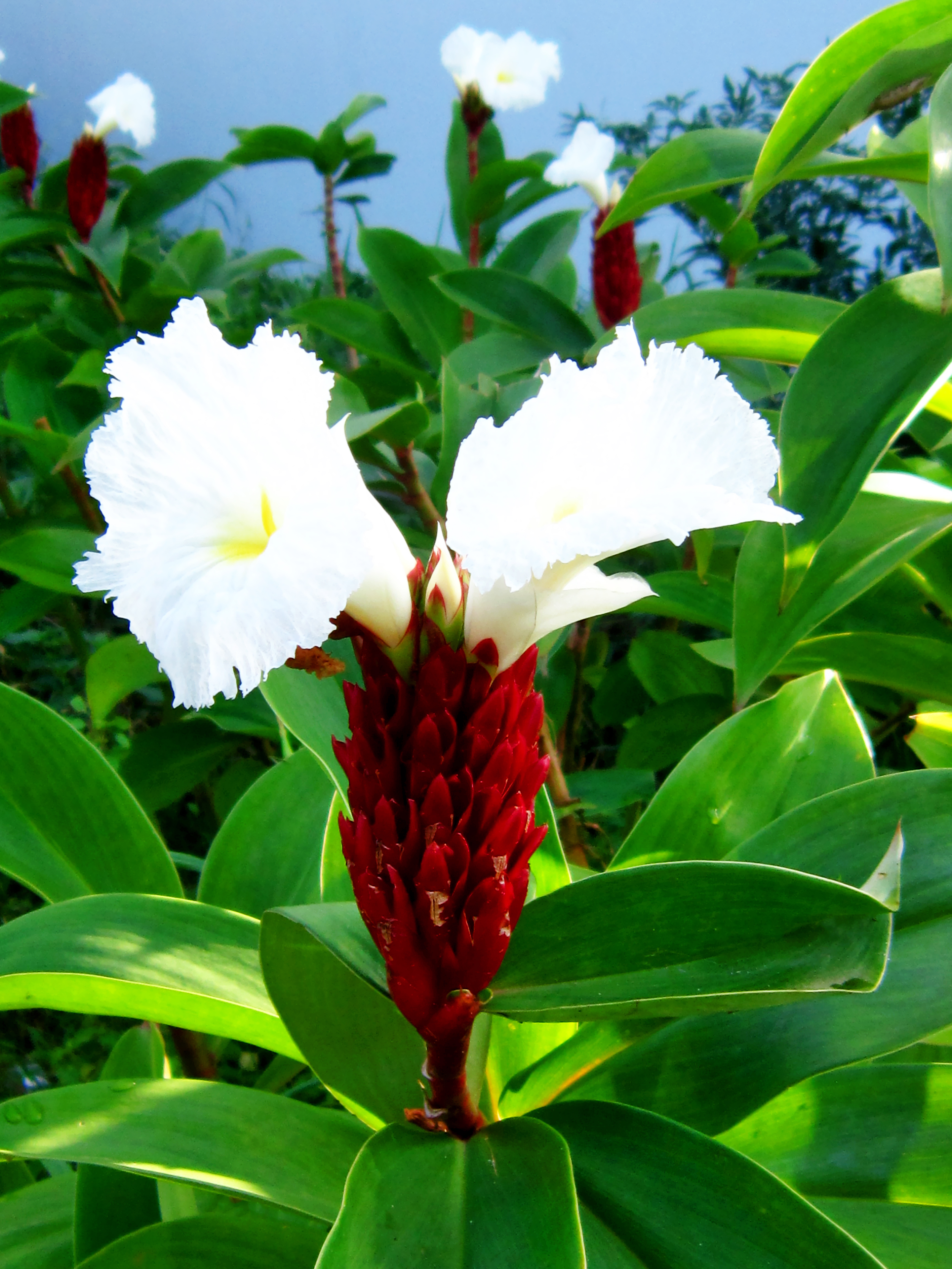 Mía dò ở Việt Nam.